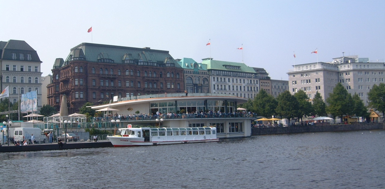 Alsterpavillon an der Hamburger Binnenalster Architekt: Ferdinand Streb This is a photograph of an architectural monument.